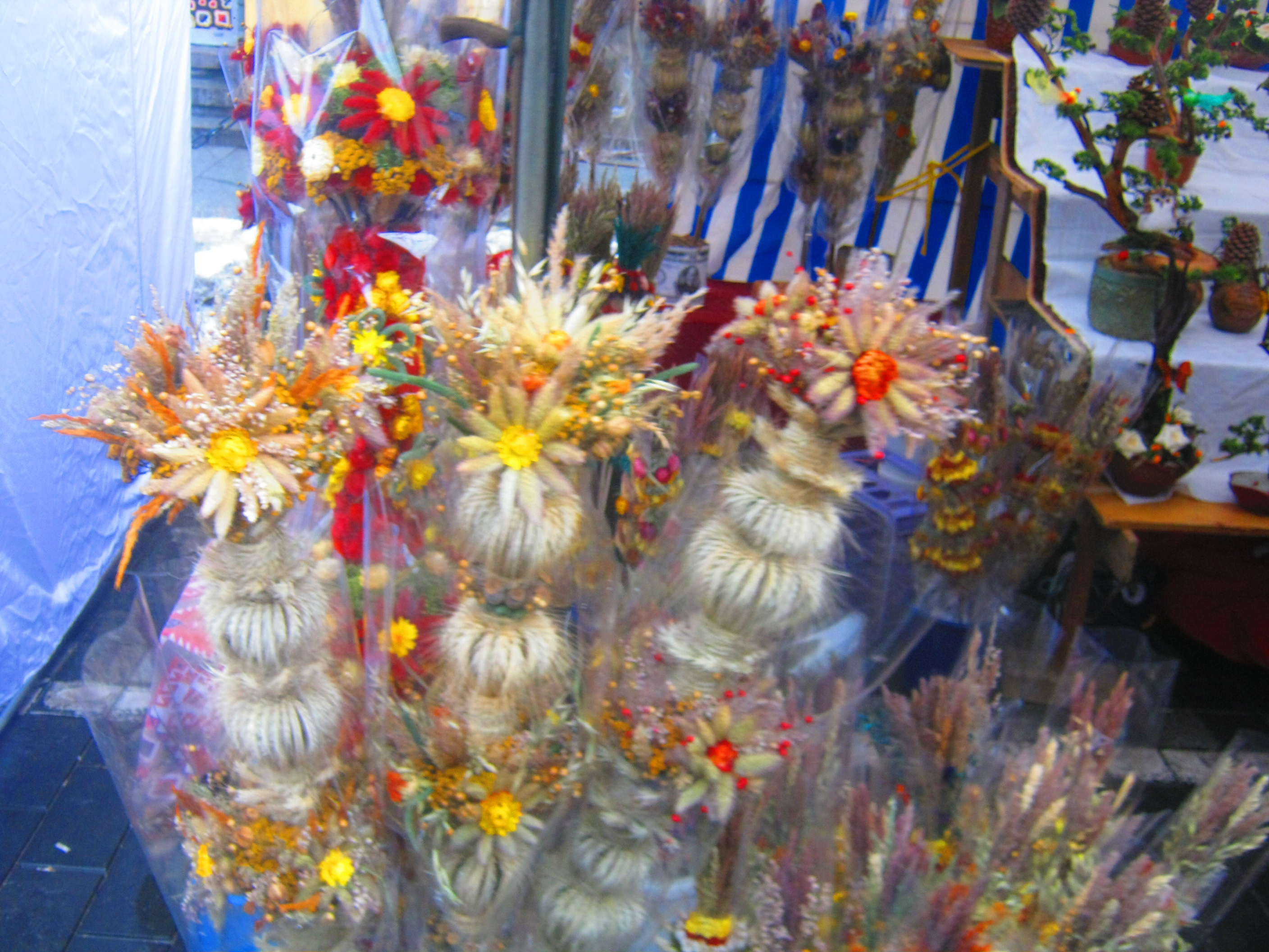 Kaziuko mugė 2013